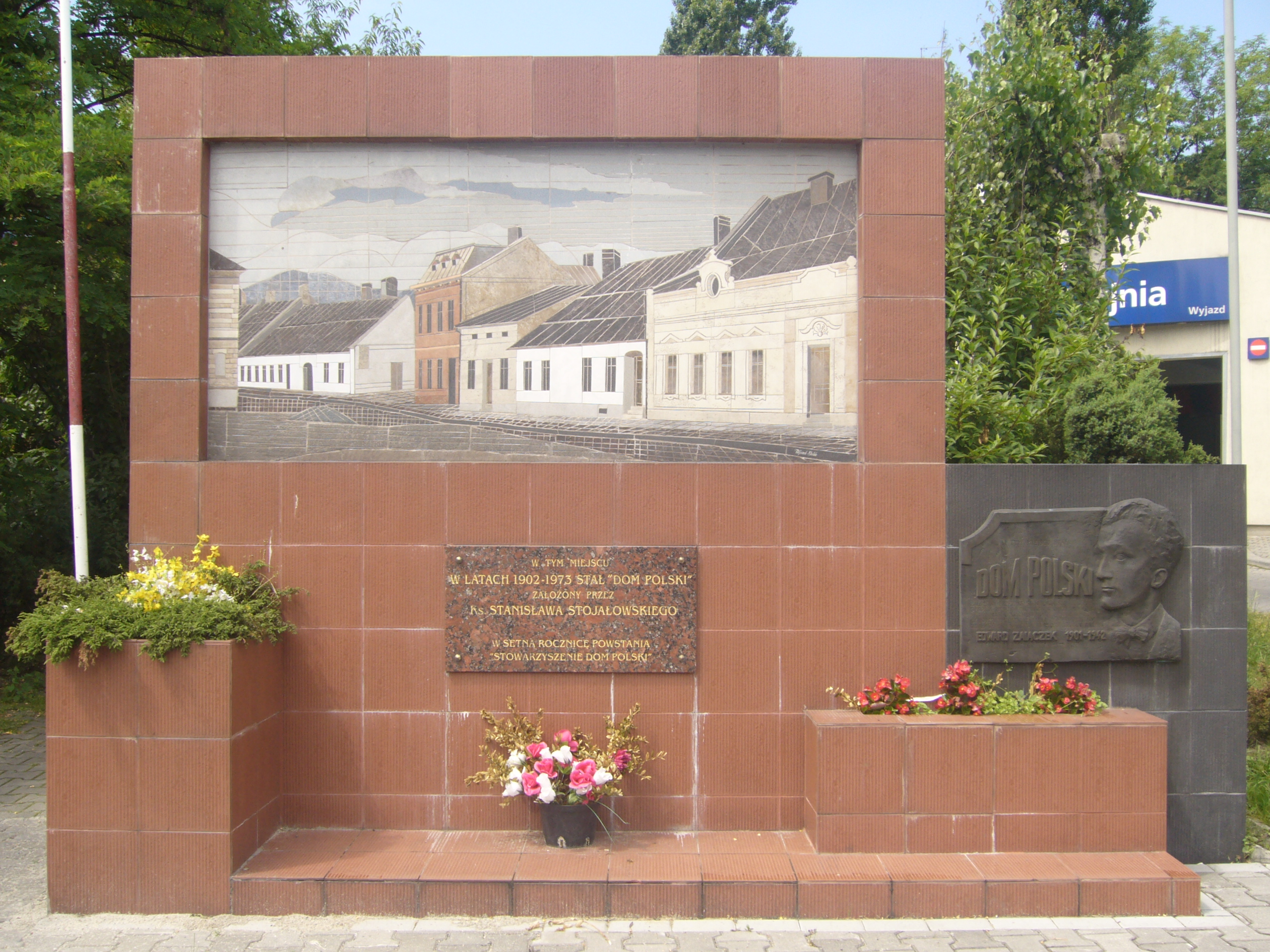 Tablica upamiętniająca istnienie w Bielsku-Białej "Domu Polskiego".